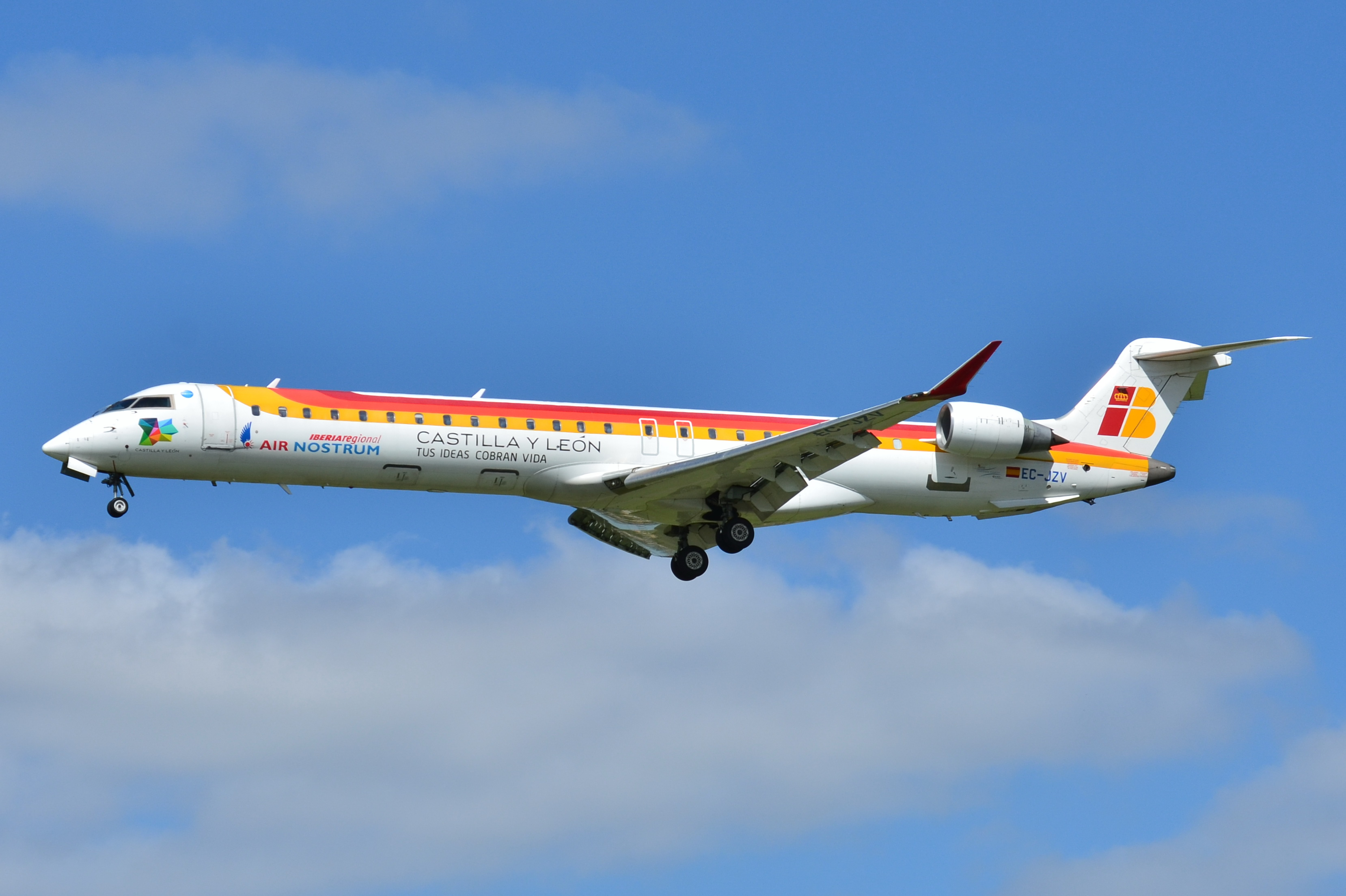 Photo prise à l'aéroport de Toulouse-Blagnac (LFBO) en France. Picture take at Toulouse-Blagnac Airport (LFBO) in France.